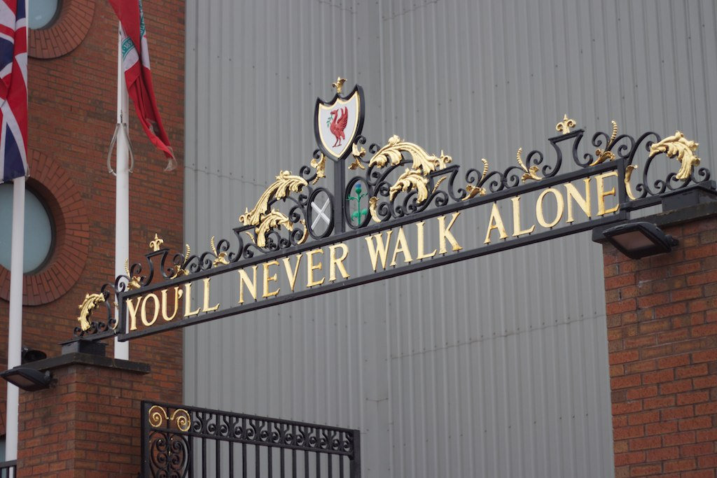 YNWA